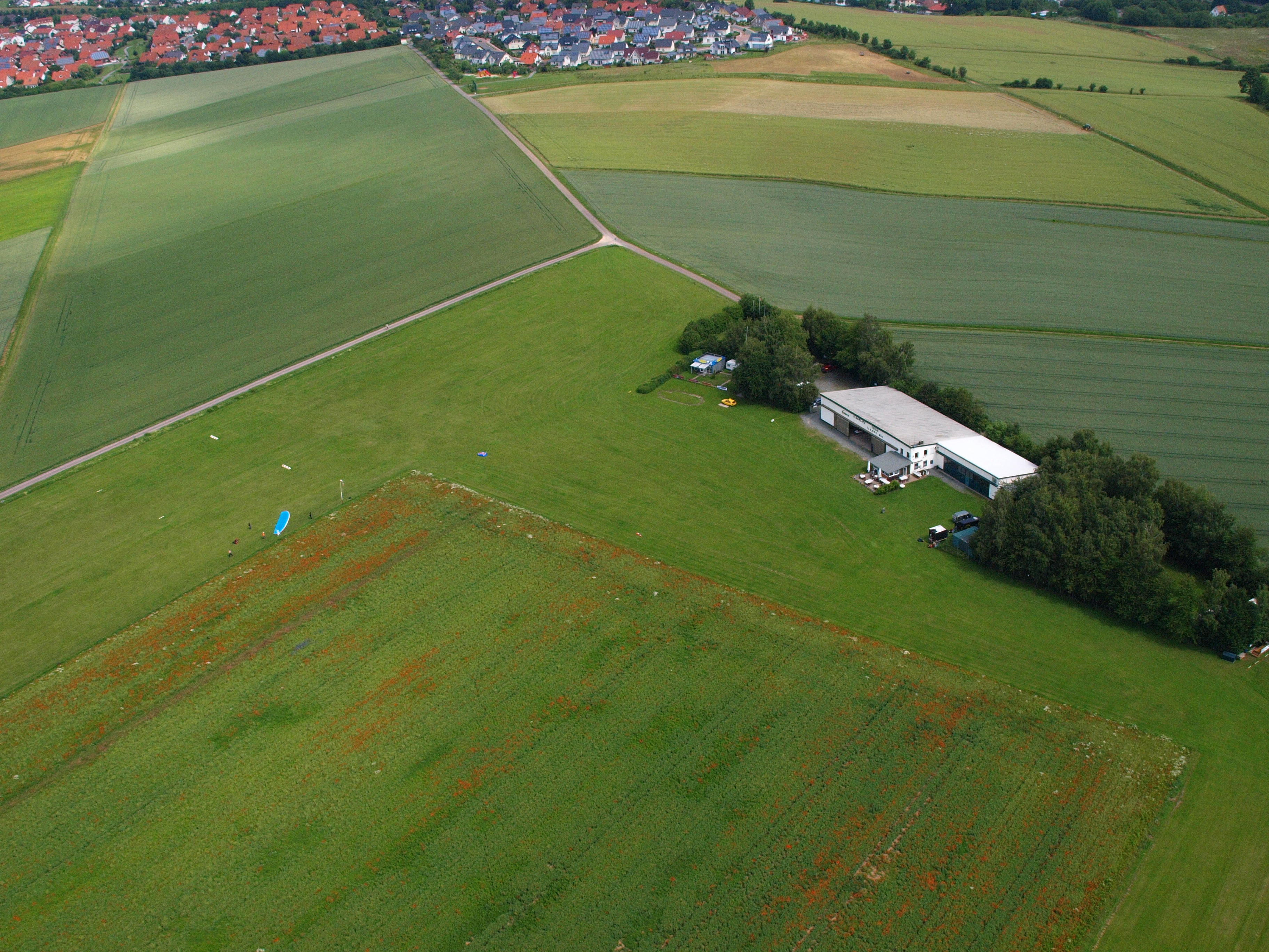 Korbach, Flugplatz: Luftaufnahme; die Start- und Landebahn beginnt vorn links